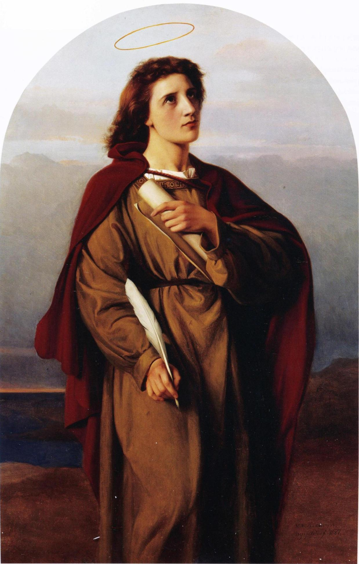 Victorine Nordenswanin maalaus.